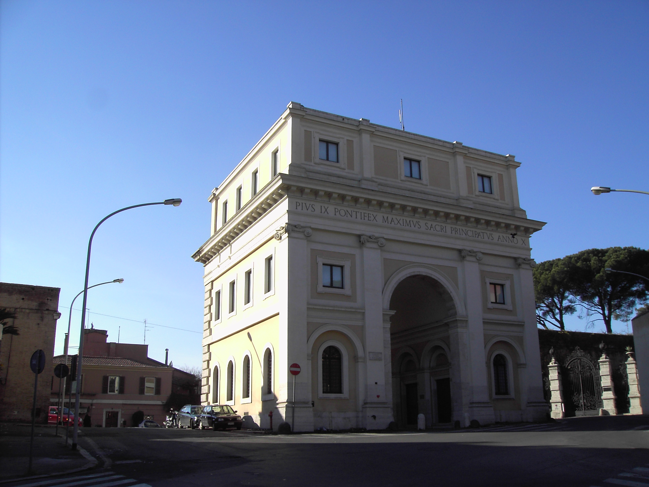 Roma, Porta san Pancrazio.